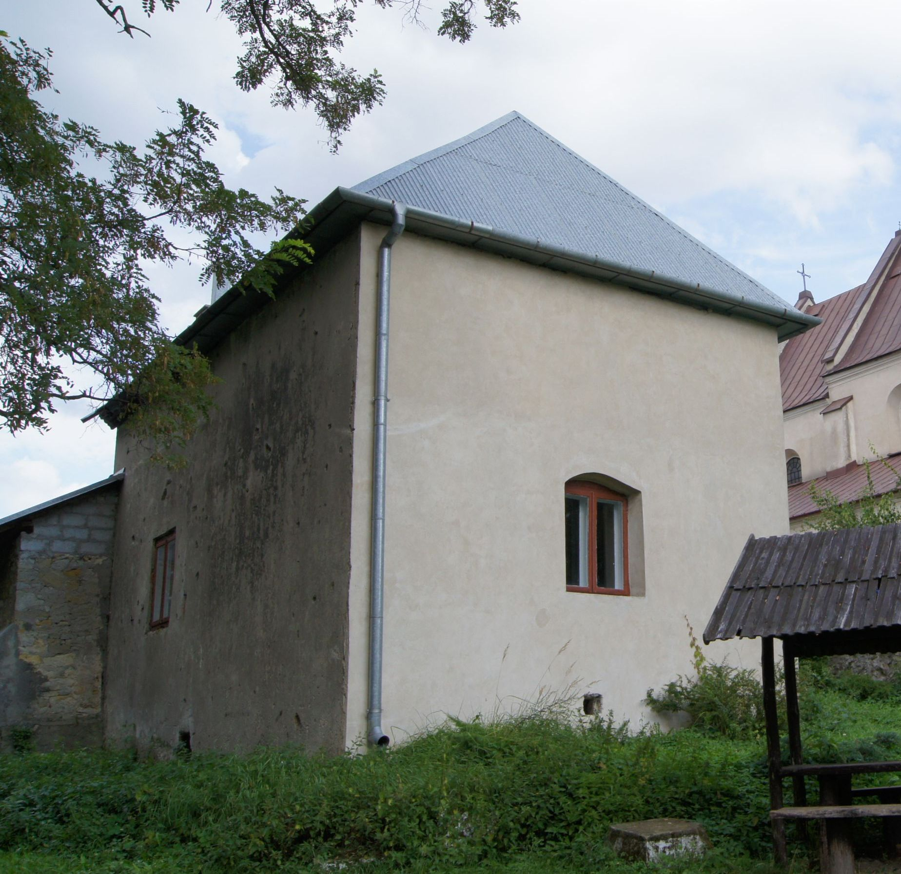 Dom ministra ariańskiego w Rakowie